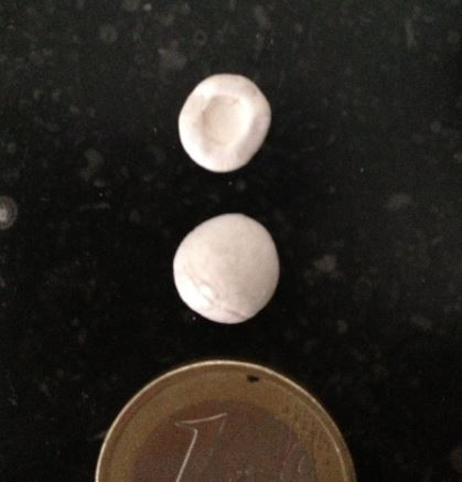 Gastrolithes d'écrevisse recueillis sur le plateau de Millevaches dans des épreintes d'écrevisses.